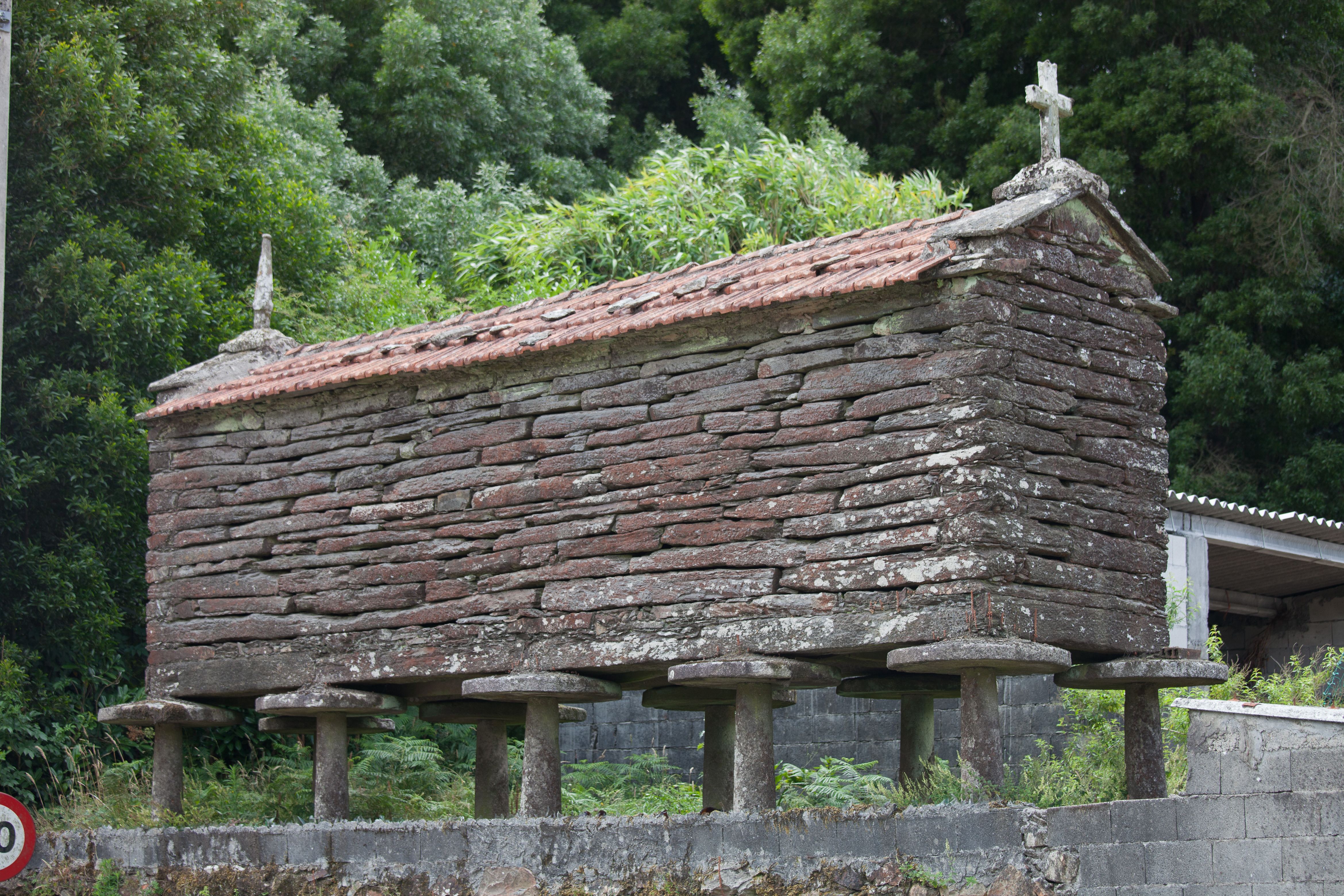 Hórreo á par da ermida de San Xosé de Val, Mazaricos, Galiza